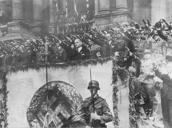 Керівництво Галичини вітає добровольців. На передньому плані - Голова Військової Управи полк. Альфред Бізанц. Парад рекрутів до СС Галичина у Львові